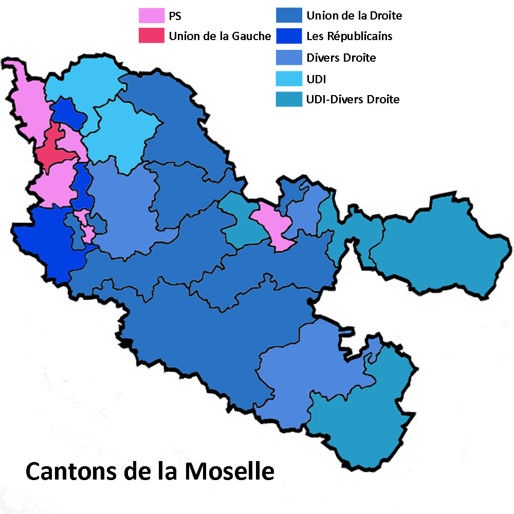 Étiquette politique des cantons de la Moselle